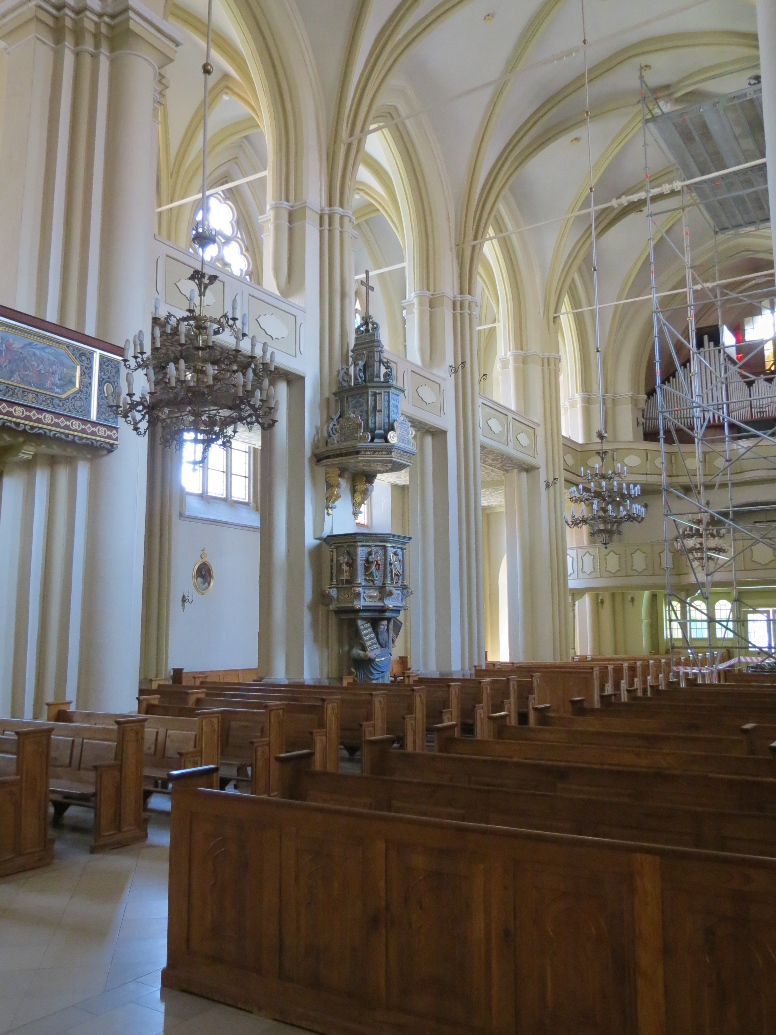 Złotoryja, kościół pomocniczy p.w. Narodzenia NMP, 1230, XVI, XX